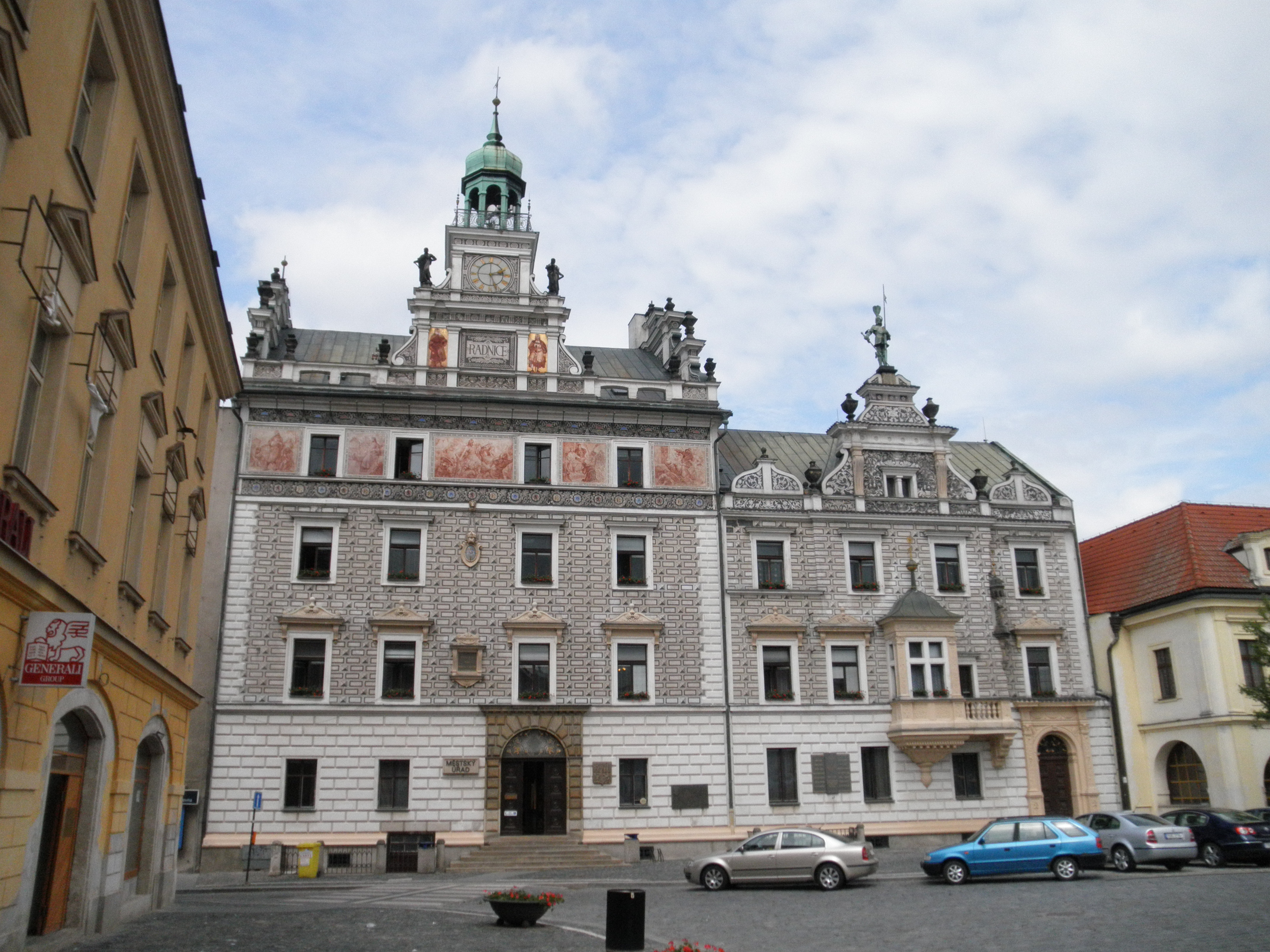 Radnice (Kolín), Karlovo nám. 77, Kolín